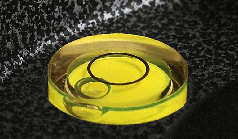 Dosenlibelle. GNU-FDL, selbst fotografiert